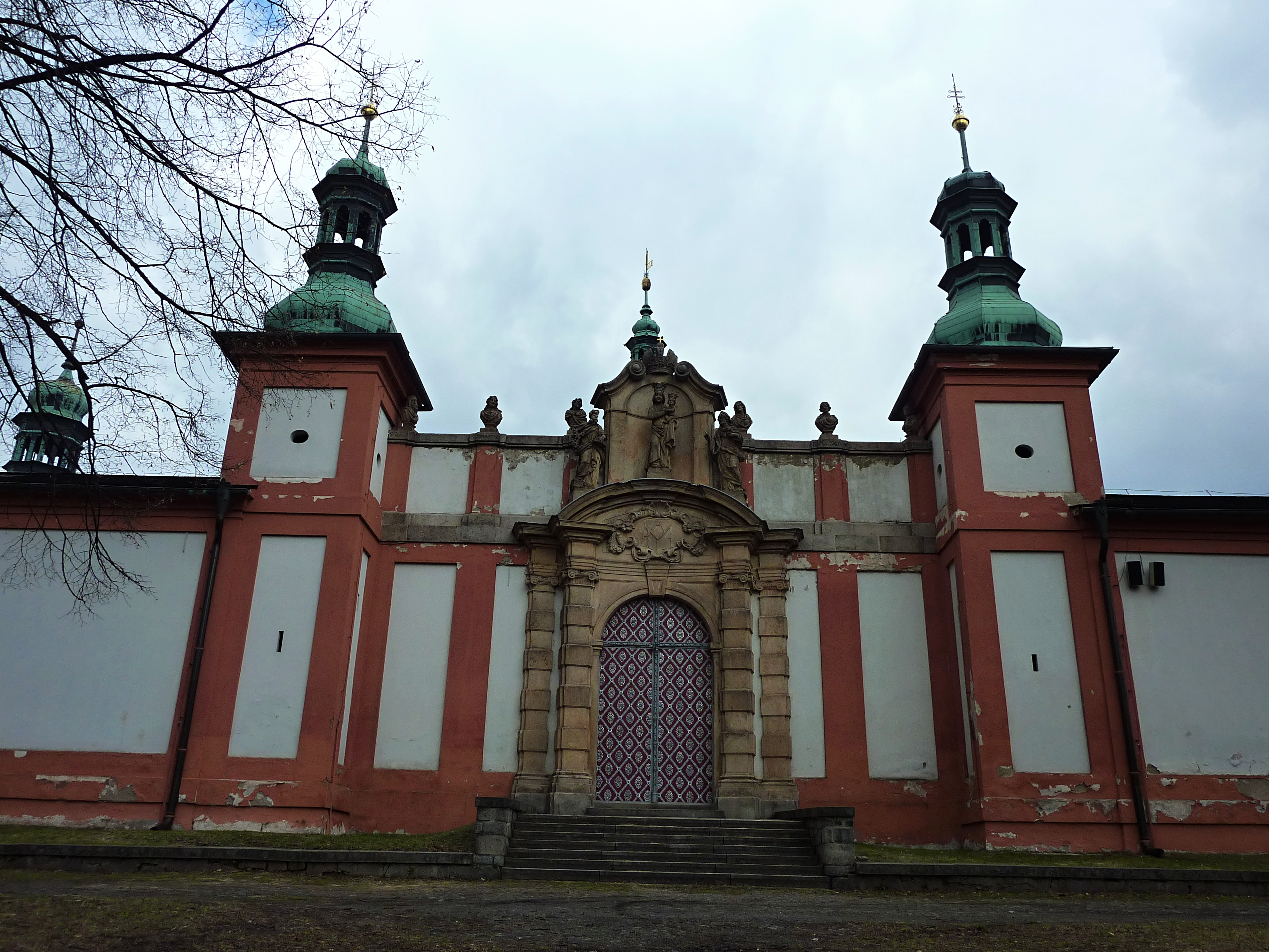 Poutní místo .